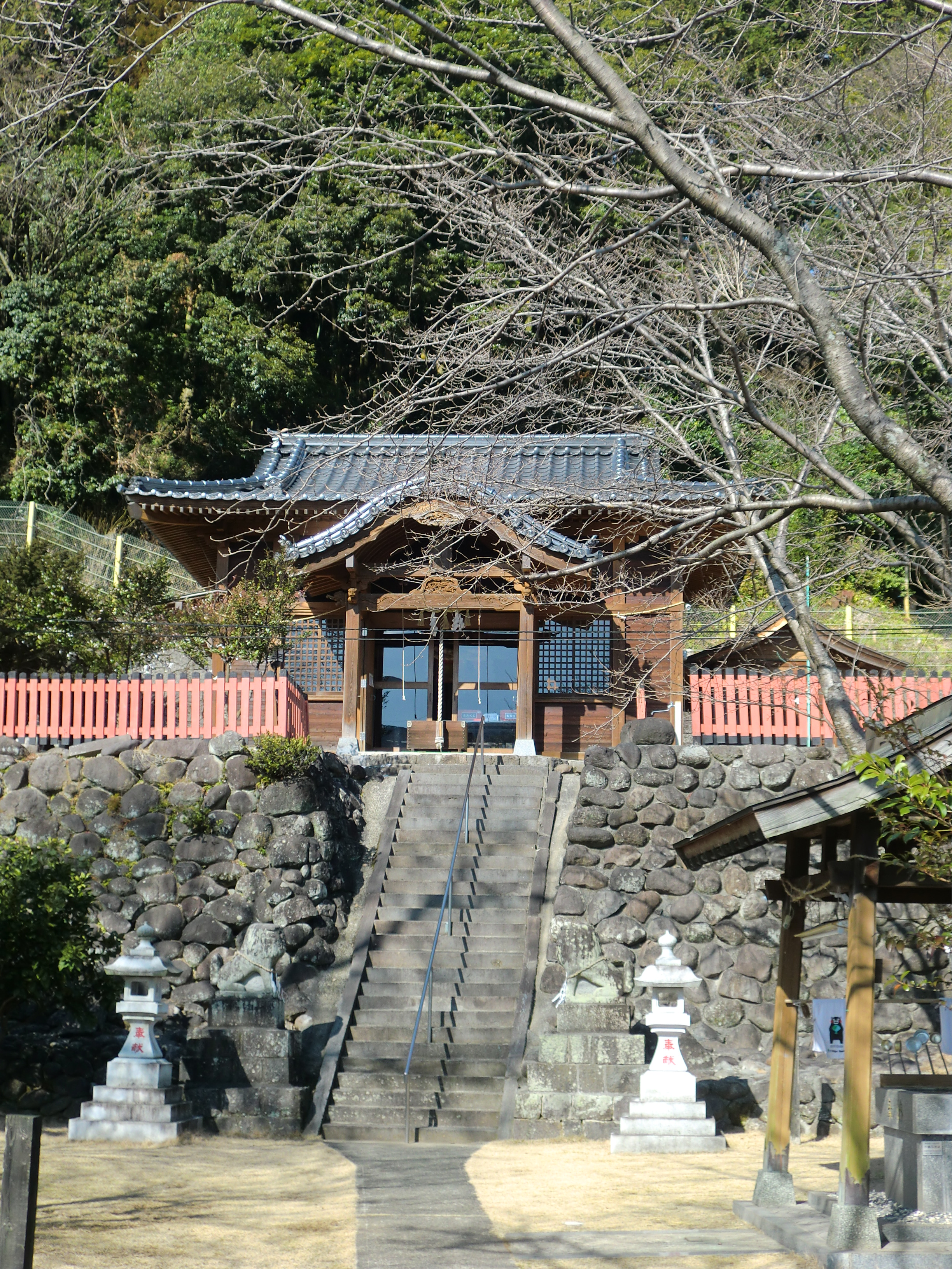 熊本県阿蘇郡西原村にある白山姫（しらやまひめ）神社